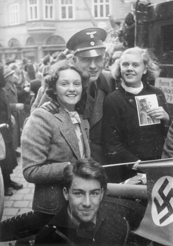 This description has been identified as biased or incorrect: Original Nazi-propaganda descriptionGlückstrahlende Menschen in Salzburg. Am Sonnabend, als die deutschen Truppen in Salzburg einmarschierten, erfasste die gesamte Bevölkerung ein Taumel der Begeisterung. Überall sah man strahlende Mienen, und vielfach trugen die Menschen Bilder des Führers, und fast alle schwenkten Hakenkreuzfähnchen. 13.3.1938 [Herausgabedatum] Scherl Bilderdienst, Berlin